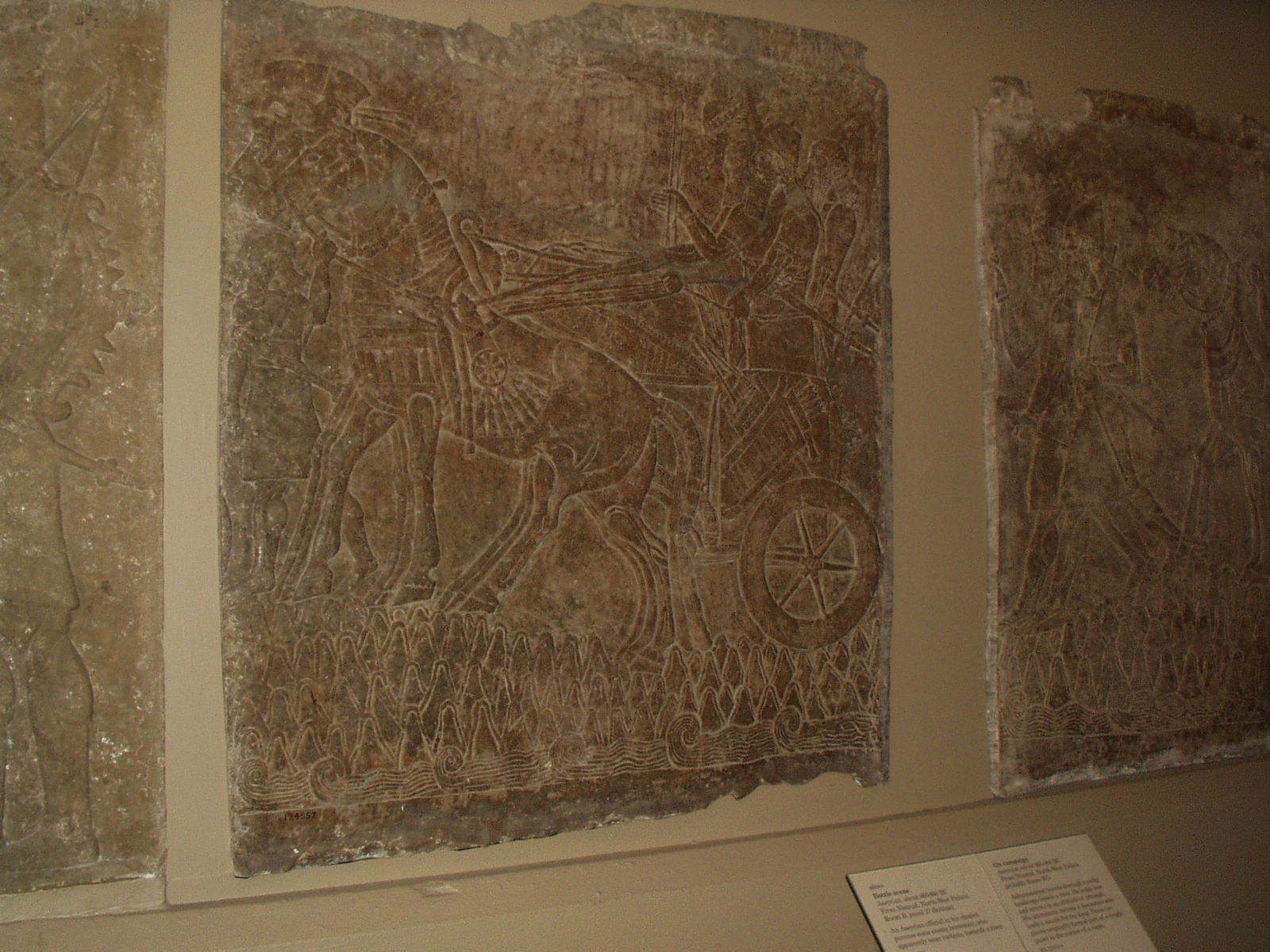 eigen foto Britisch Museum 2003 basreliëf met strijdwagen afkomstig uit Irak